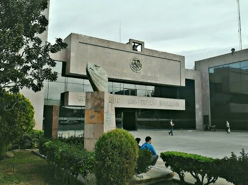 principal gp